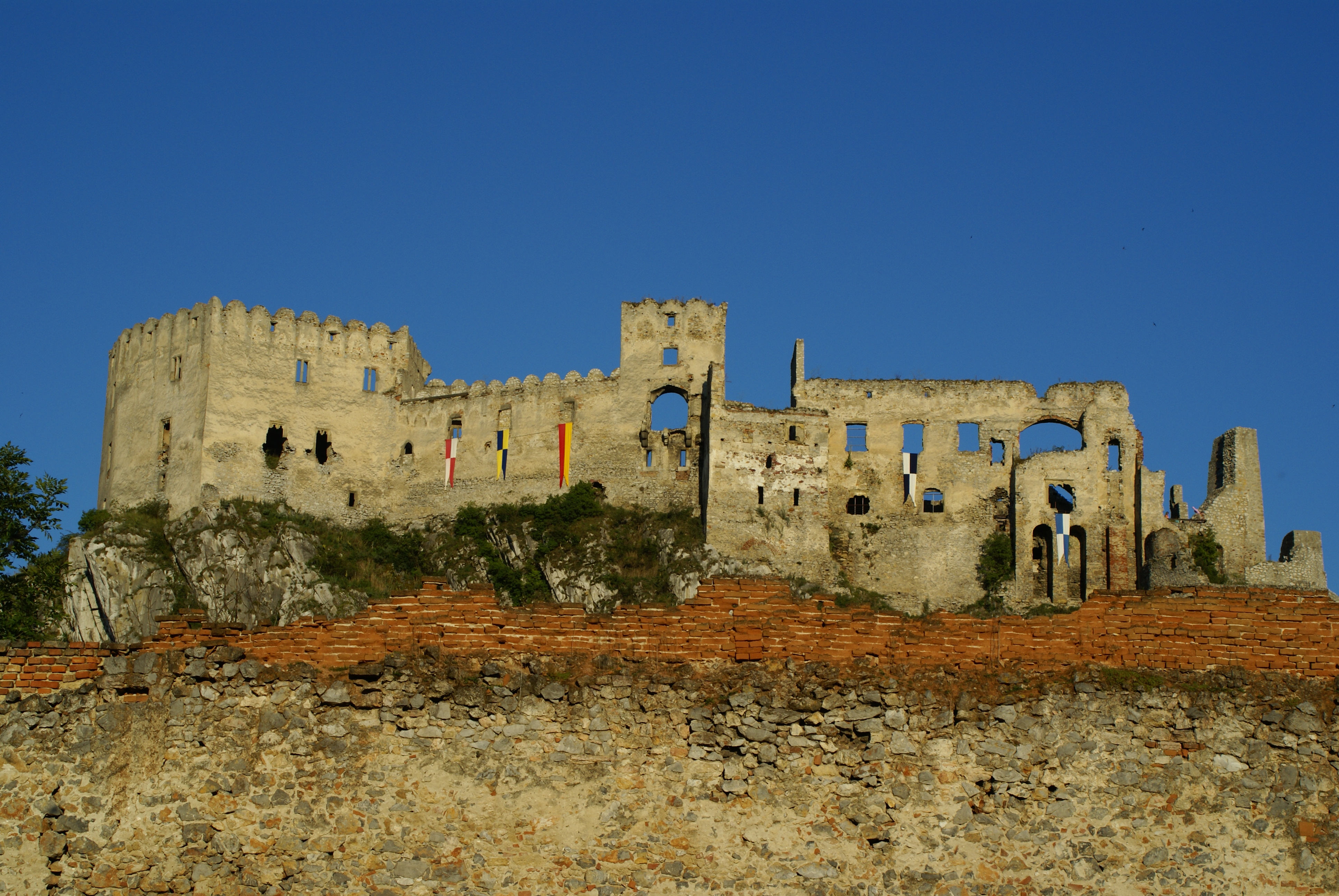 Beckov Castle, Slovak Republic